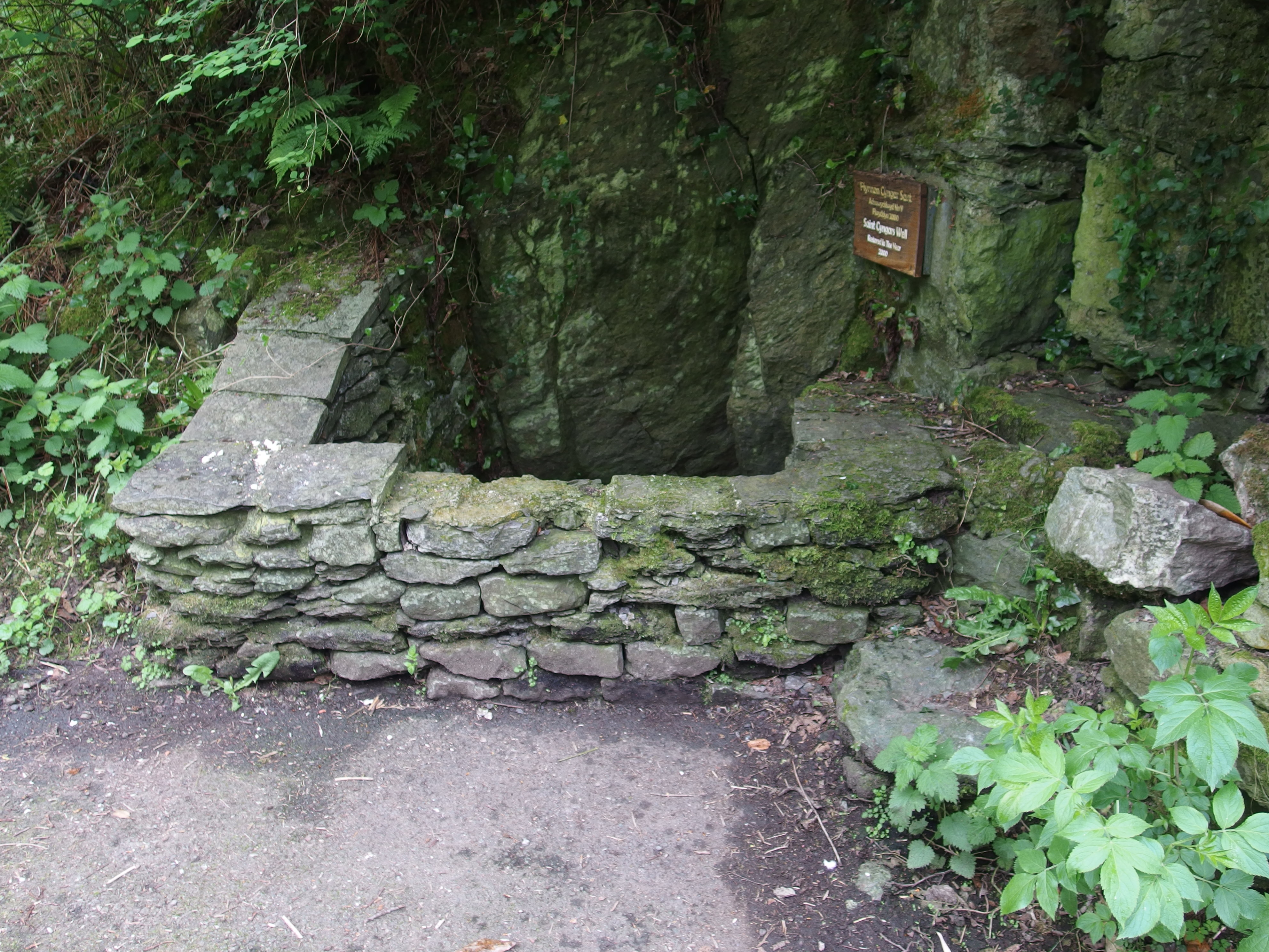 Ffynnon Cyngar